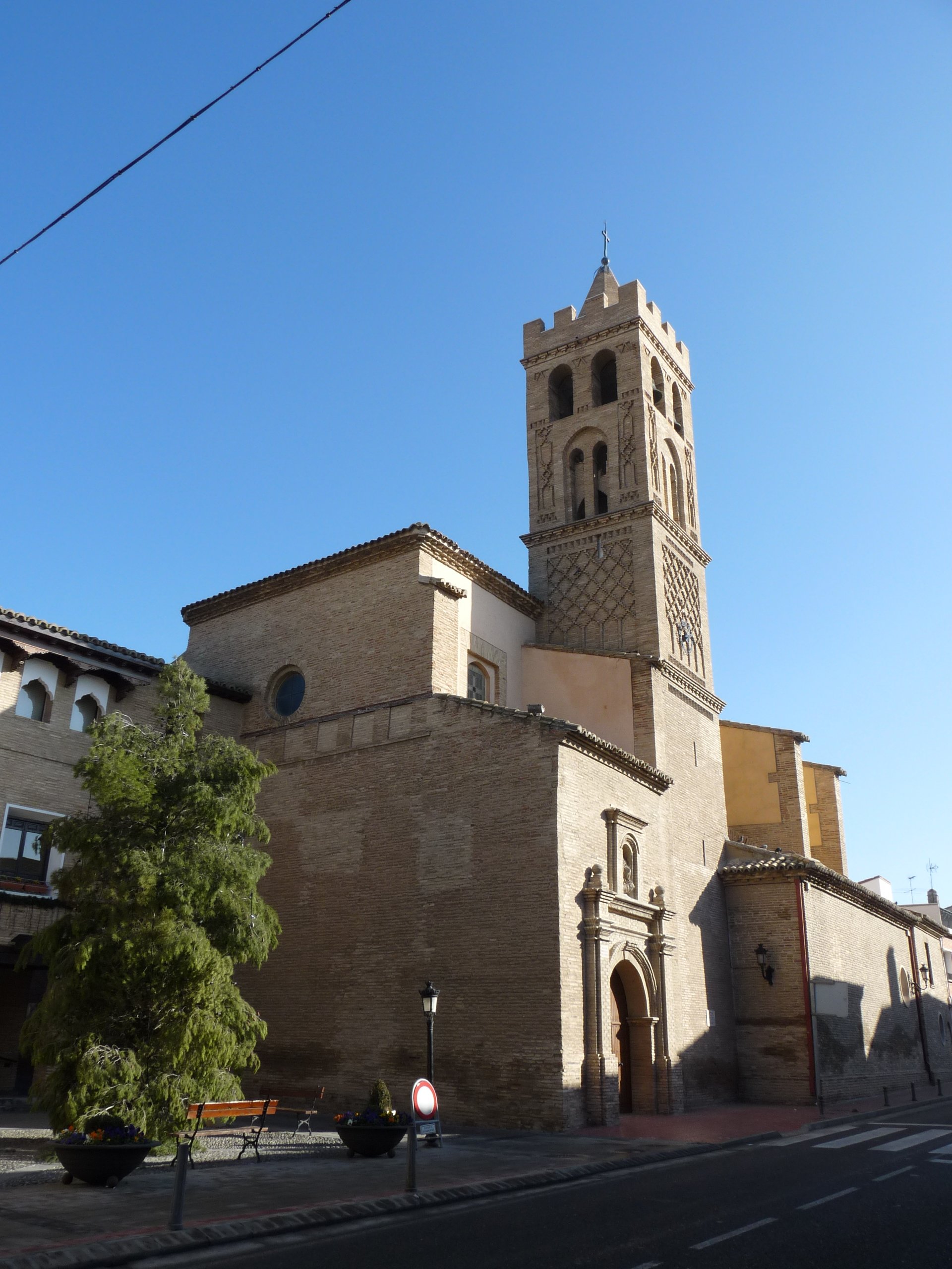 La Puebla de Alfindén - Iglesia de Nuestra Señora de la Asunción s. XIV al XVIII - Torre mudéjar del s. XVI